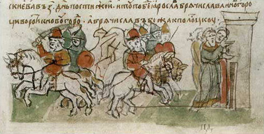 Беларуская (тарашкевіца): Мініятура Радзівілаўскага летапісу: бітва на рацэ Судоме паміж Брачыславам і дружынай Яраслава Ўладзімеравіча